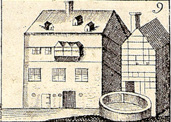 Das Bad "Im Pütz" in Burtscheid 1727 mit dem vorgelagerten Kochbrunnen. Später wird das Bad in Driesch- und Neubad umbenannt.